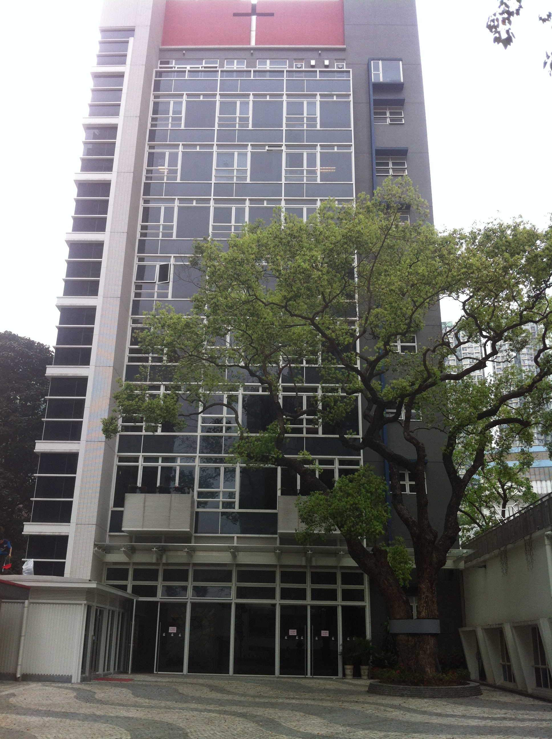 中文（香港）: 聖十字架中心, 香港, 中國